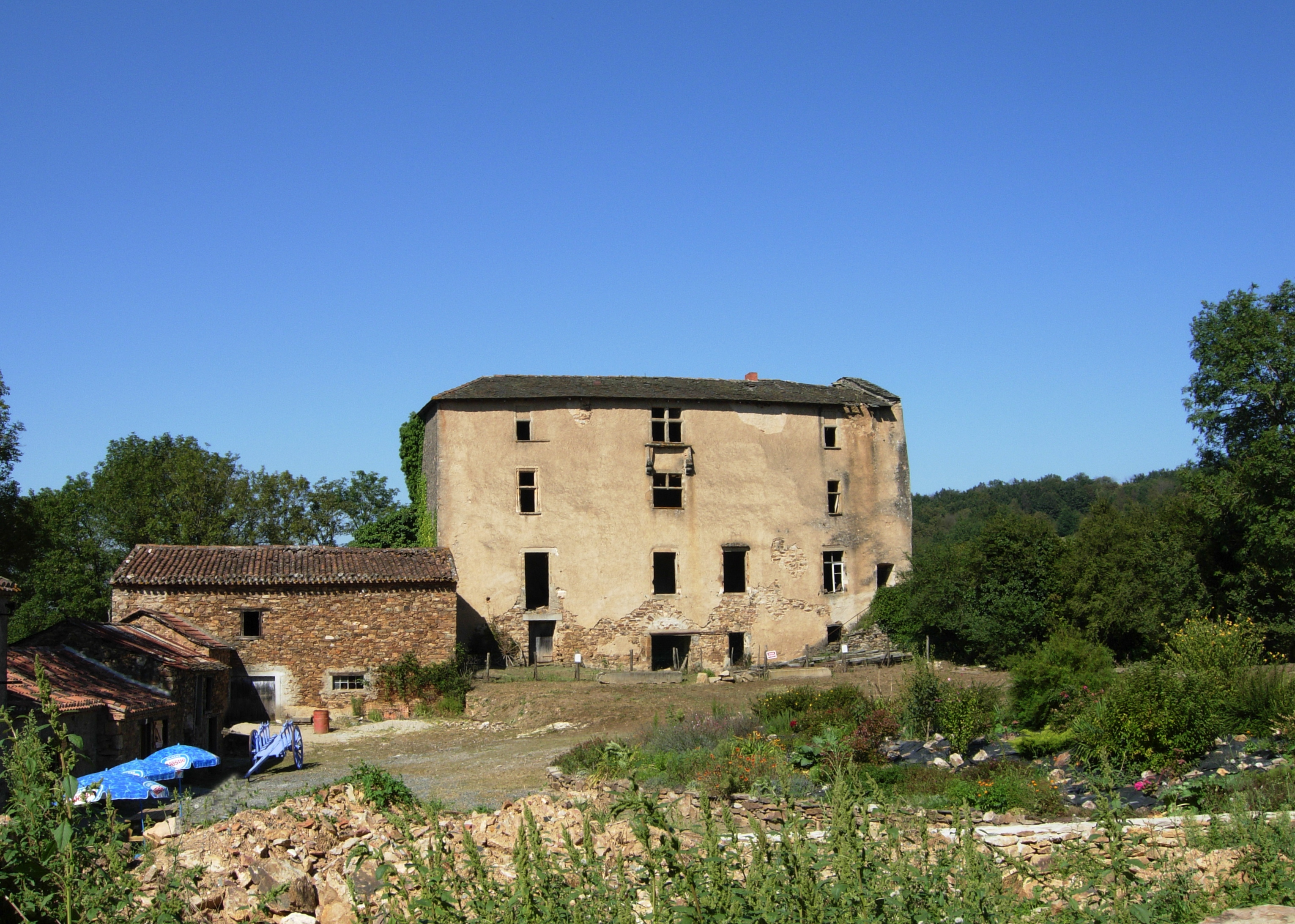 Arifat (Tarn) - château.